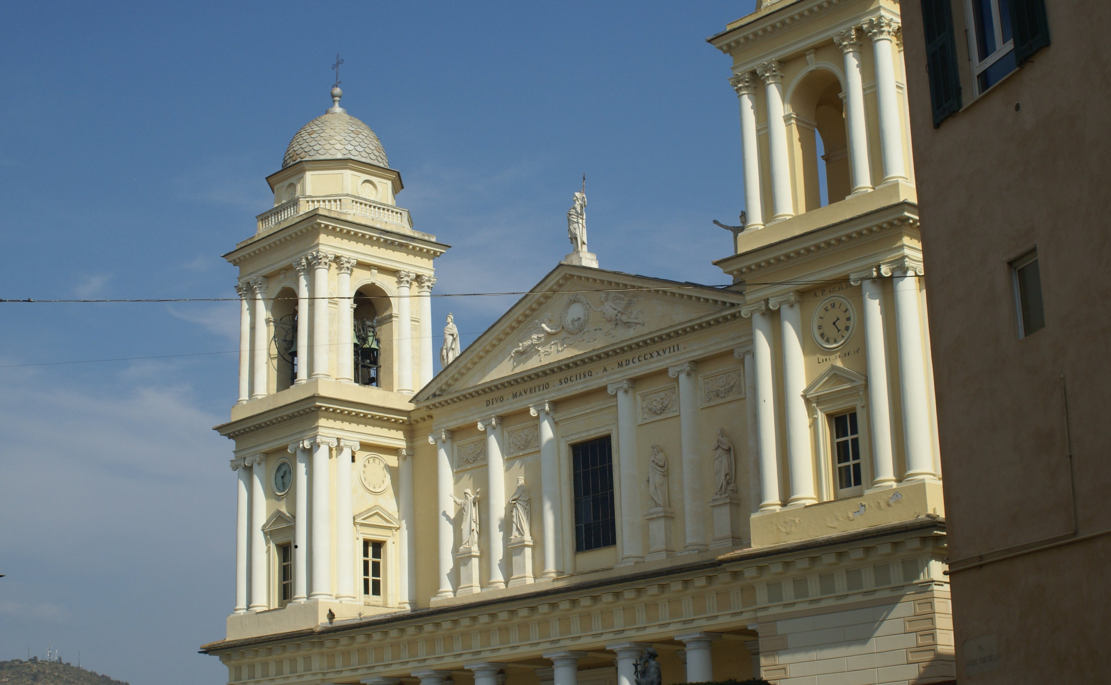 Imperia Porto Maurizio, Il Duomo